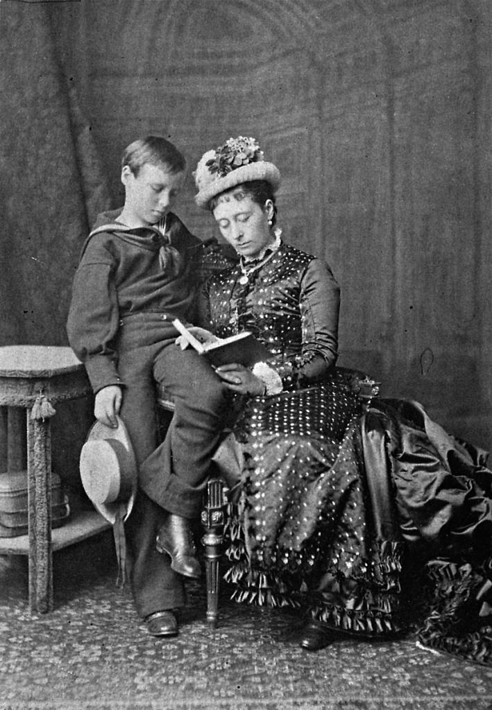 Großherzogin Alice von Hessen mit ihrem Sohn Ernst Ludwig, vor 1877